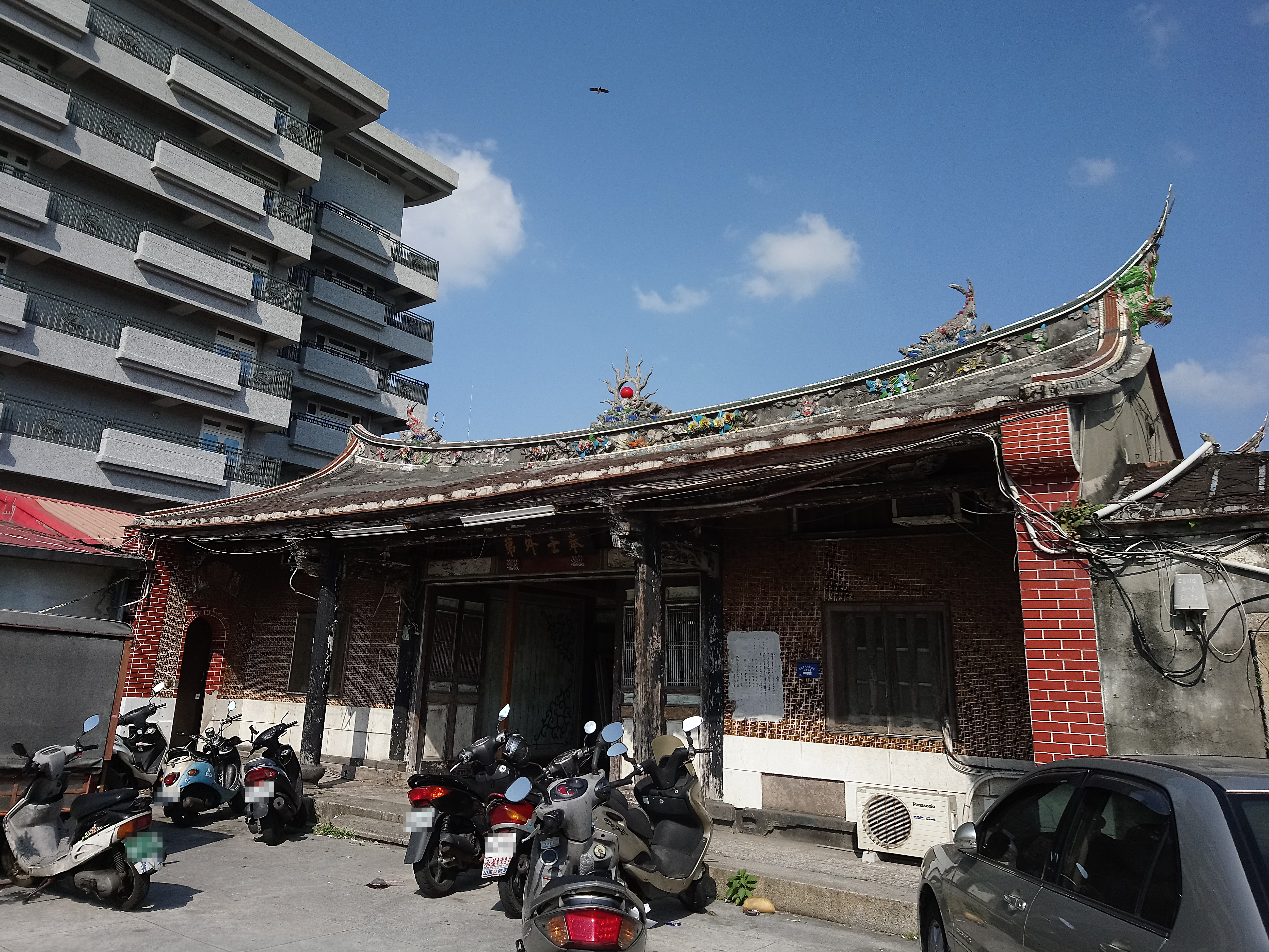 陳悅記祖宅公館廳,臺北市大同區蘭州次分區老師里